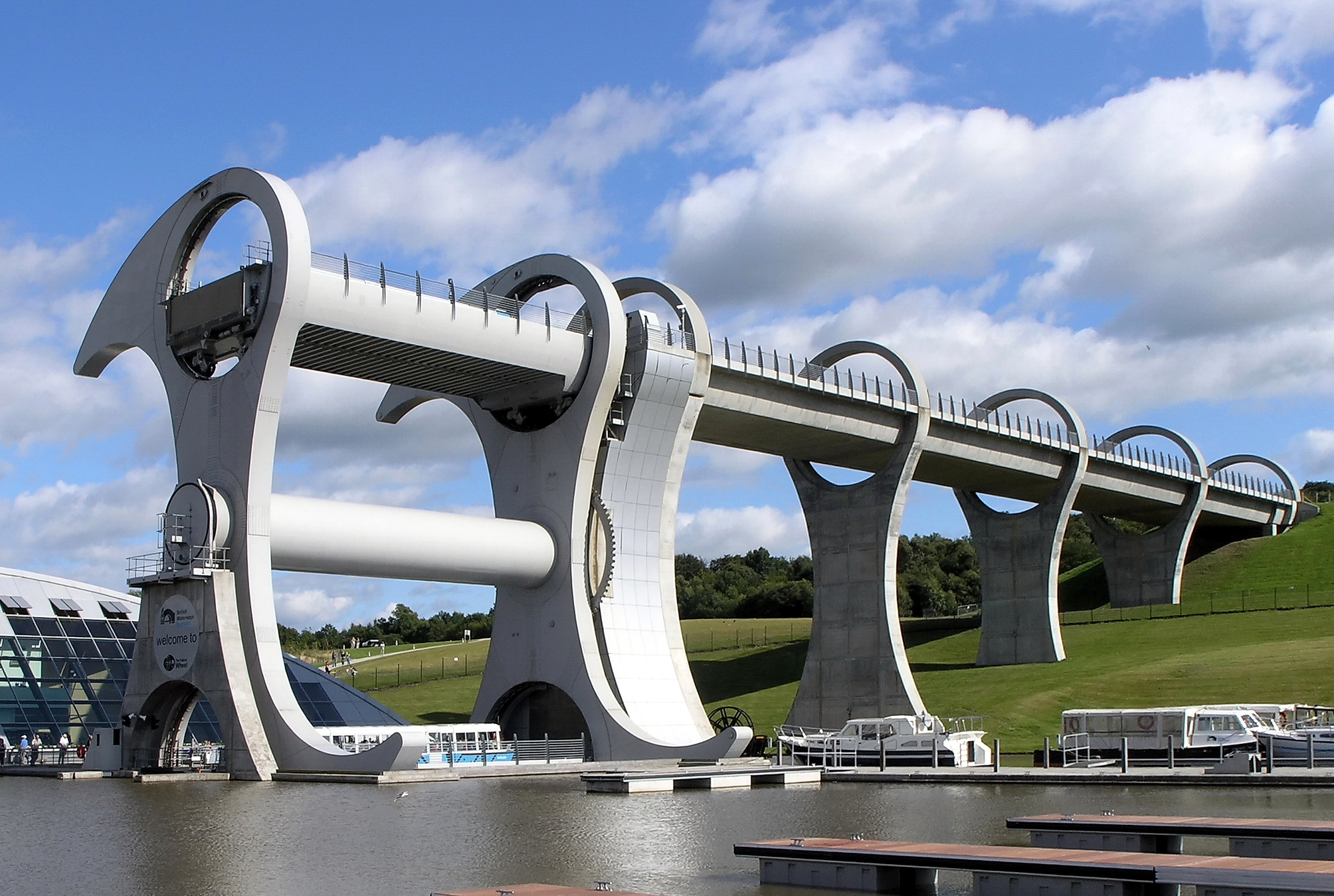 Falkirk Wheel Side 2004